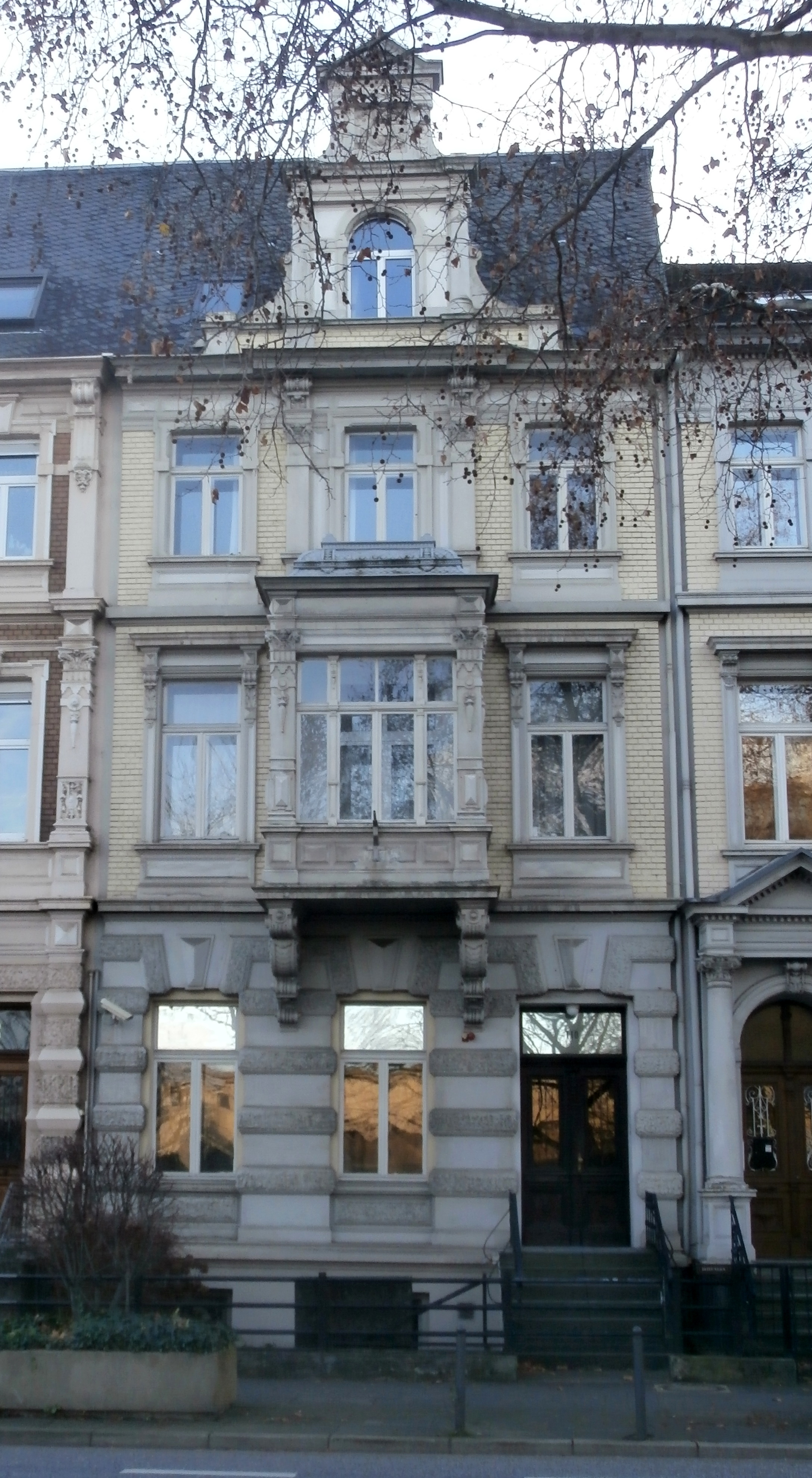 Denkmalgeschütztes Haus, Adenauerallee 110, Bonn-Gronau